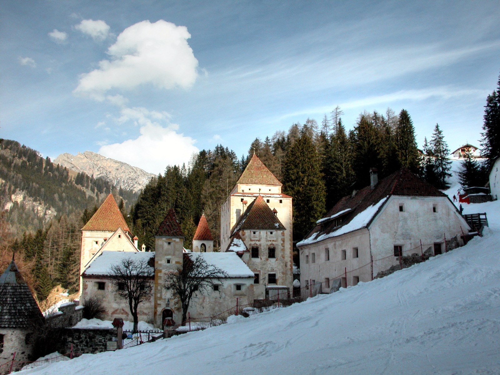 Santa Cristina Valgardena castle (Fischburg)